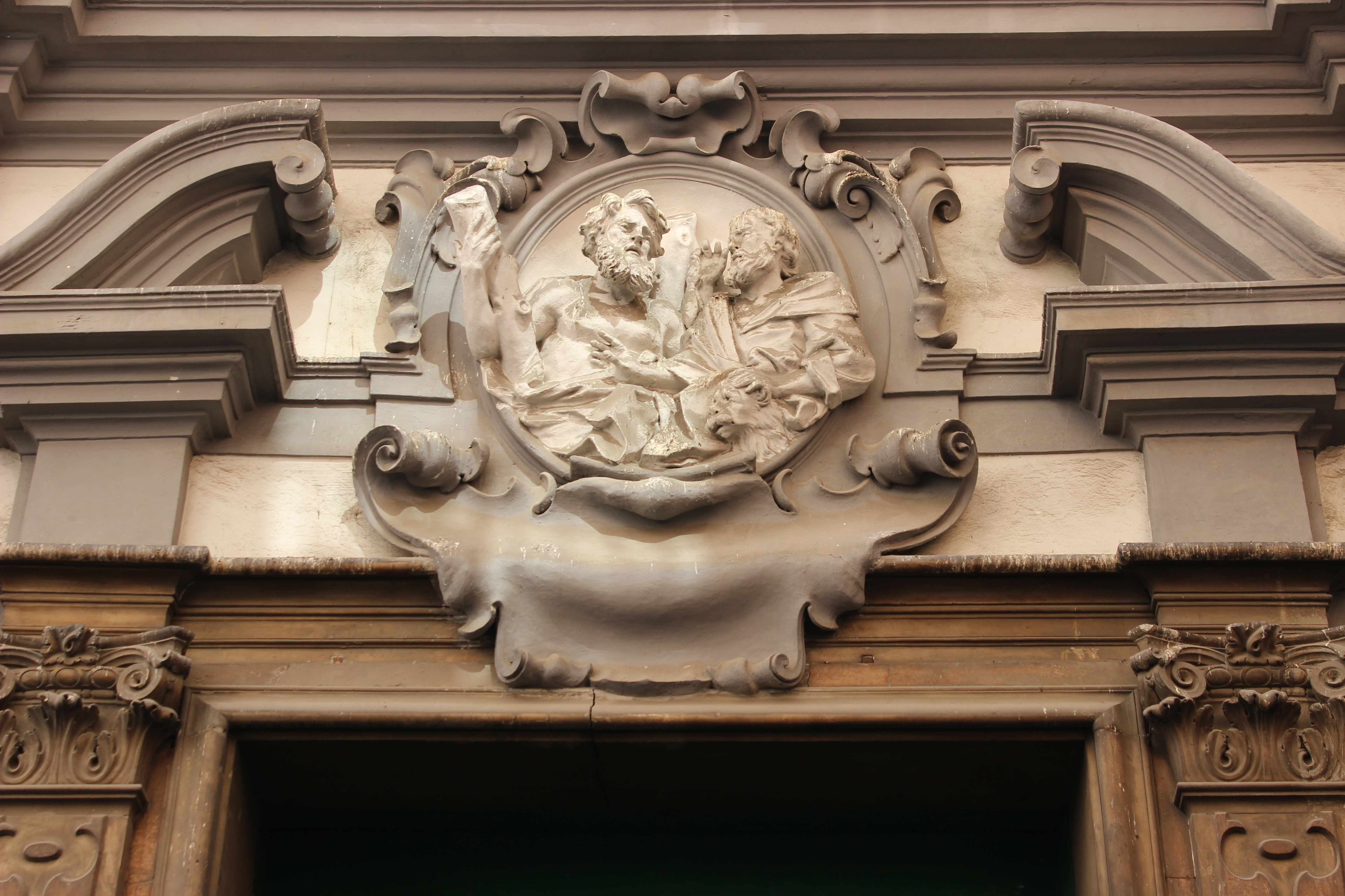 Nápoles. Santi Marco e Andrea a Nilo. Fachada.